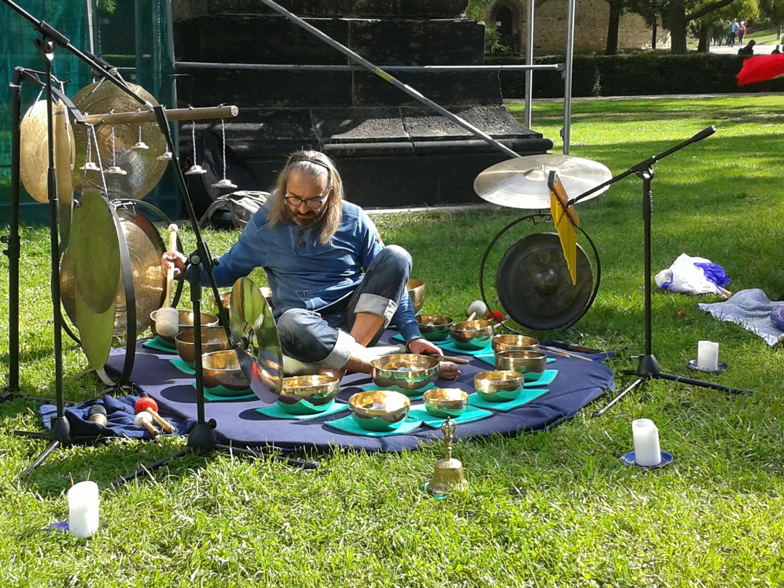 Hráč na tibetské mísy a gongy ve znamení čtyř elementů. (Vegefest + festival soběstačnosti, sobota 29. září 2018, Praha - Vyšehrad, Česká republika)